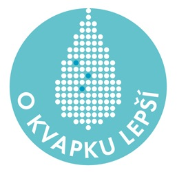 "O Kvapku Lepší" je charitatívna ochranná známka produktov, alebo služieb Nadácie Kvapka Nádeje.